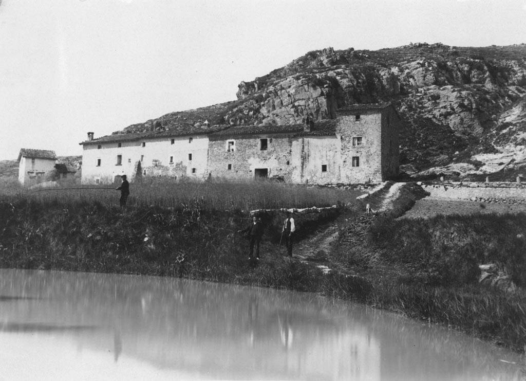 Homes pescant en un llac davant de l'Hostal de Sant Antoni, a Centelles. Lluís Vila i d'Abadal (Entre 1910 i 1936)